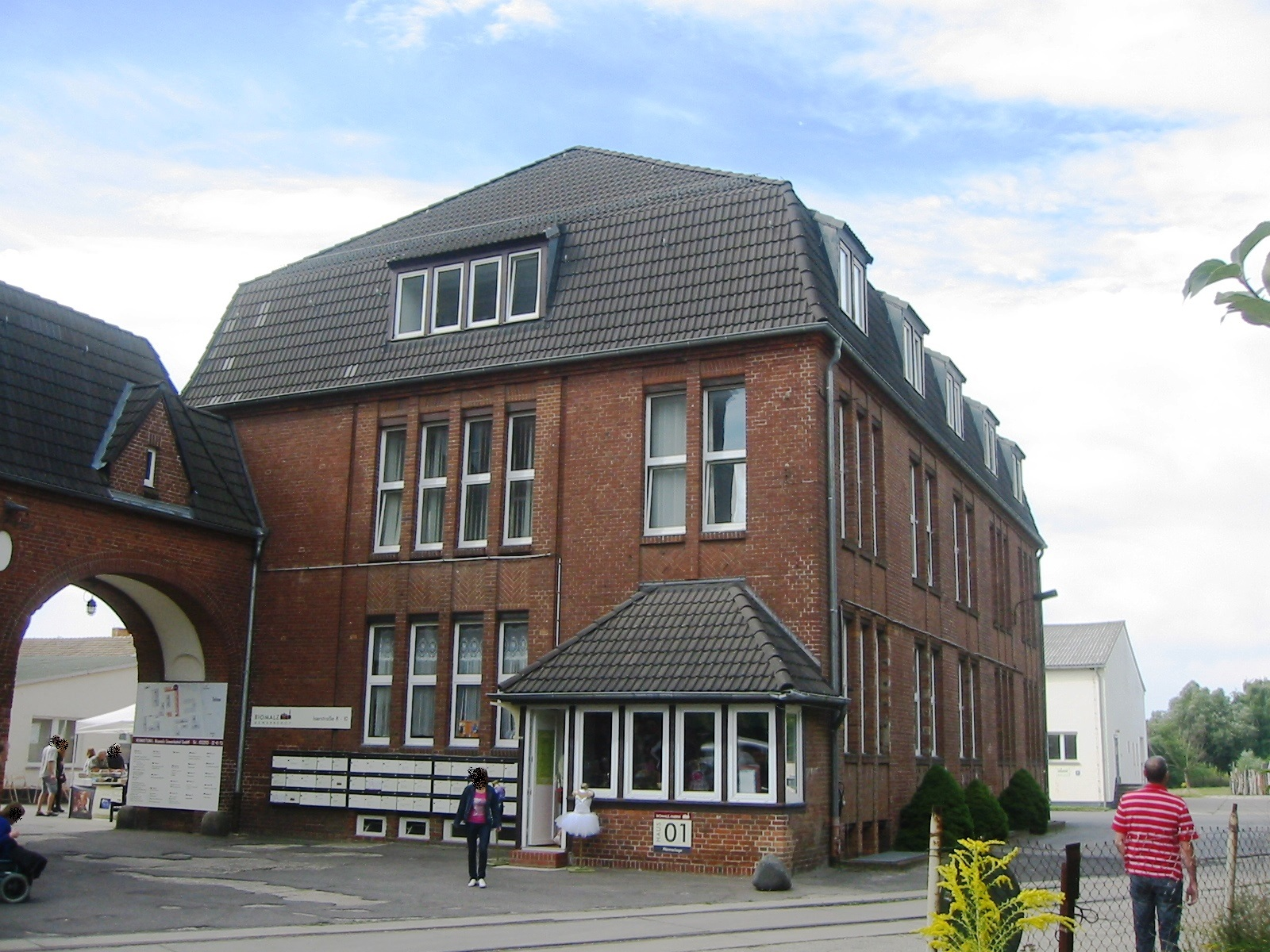 Denkmalgeschütztes Verwaltungsgebäude der Biomalz-Fabrik in Teltow, Brandenburg